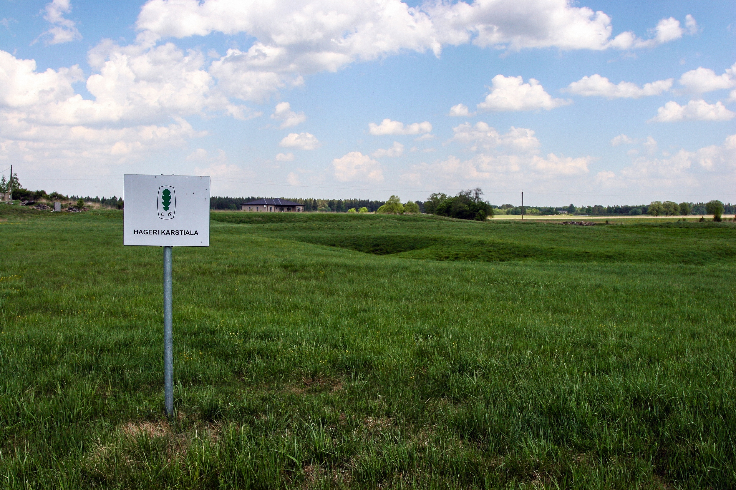 Hageri karstiala, Hageri alevik